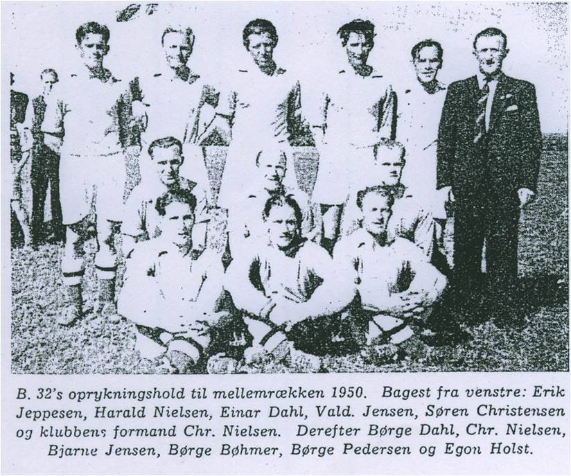 ØB anno 1950